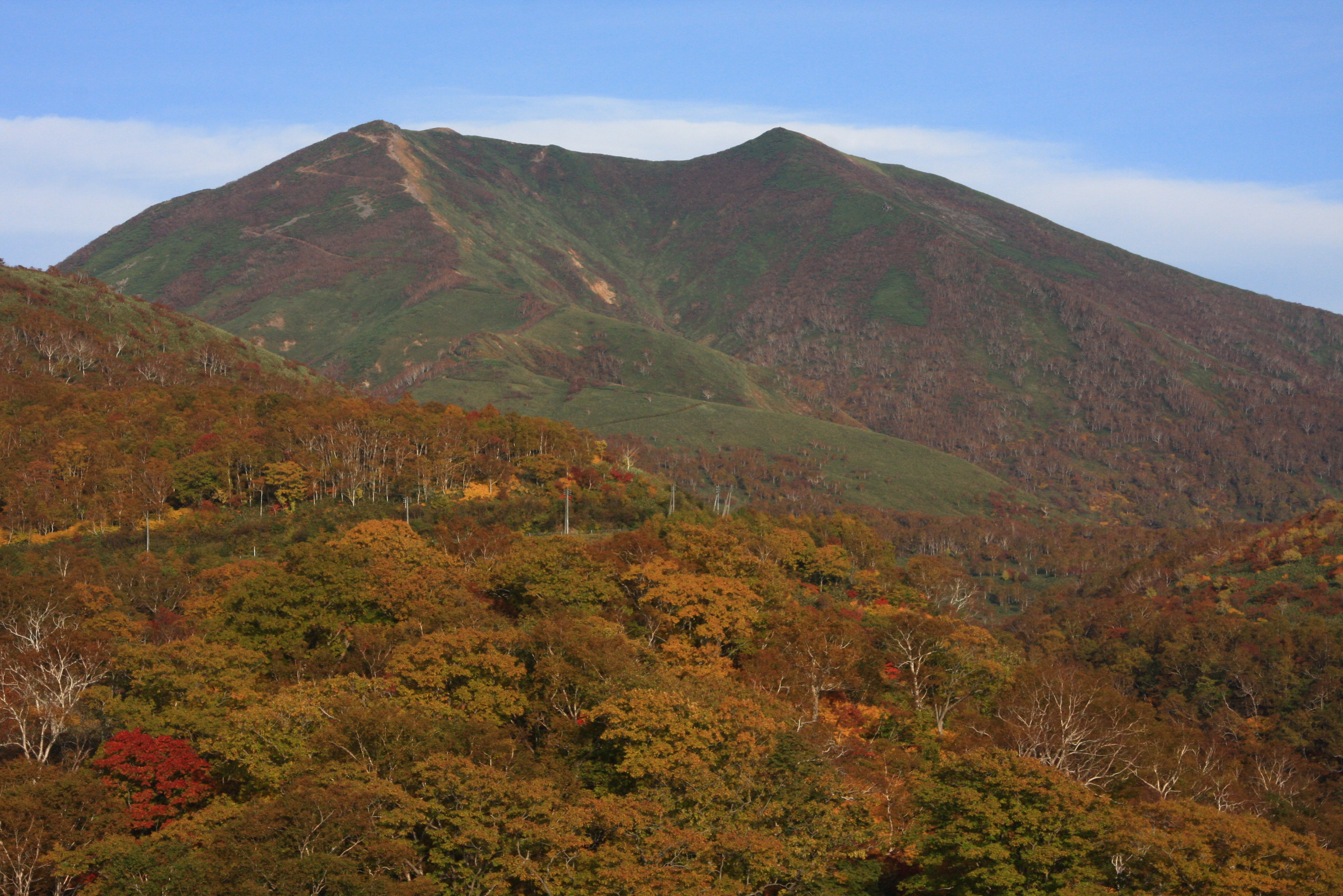 西南西から望むニセコアンヌプリ。道道58号線より撮影。